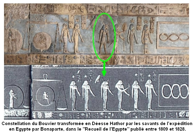 La Constellation du Bouvier-Méréou a été transformée en déesse Hathor et la Constellation de la Vierge a perdu son épi de blé dans la planche 18